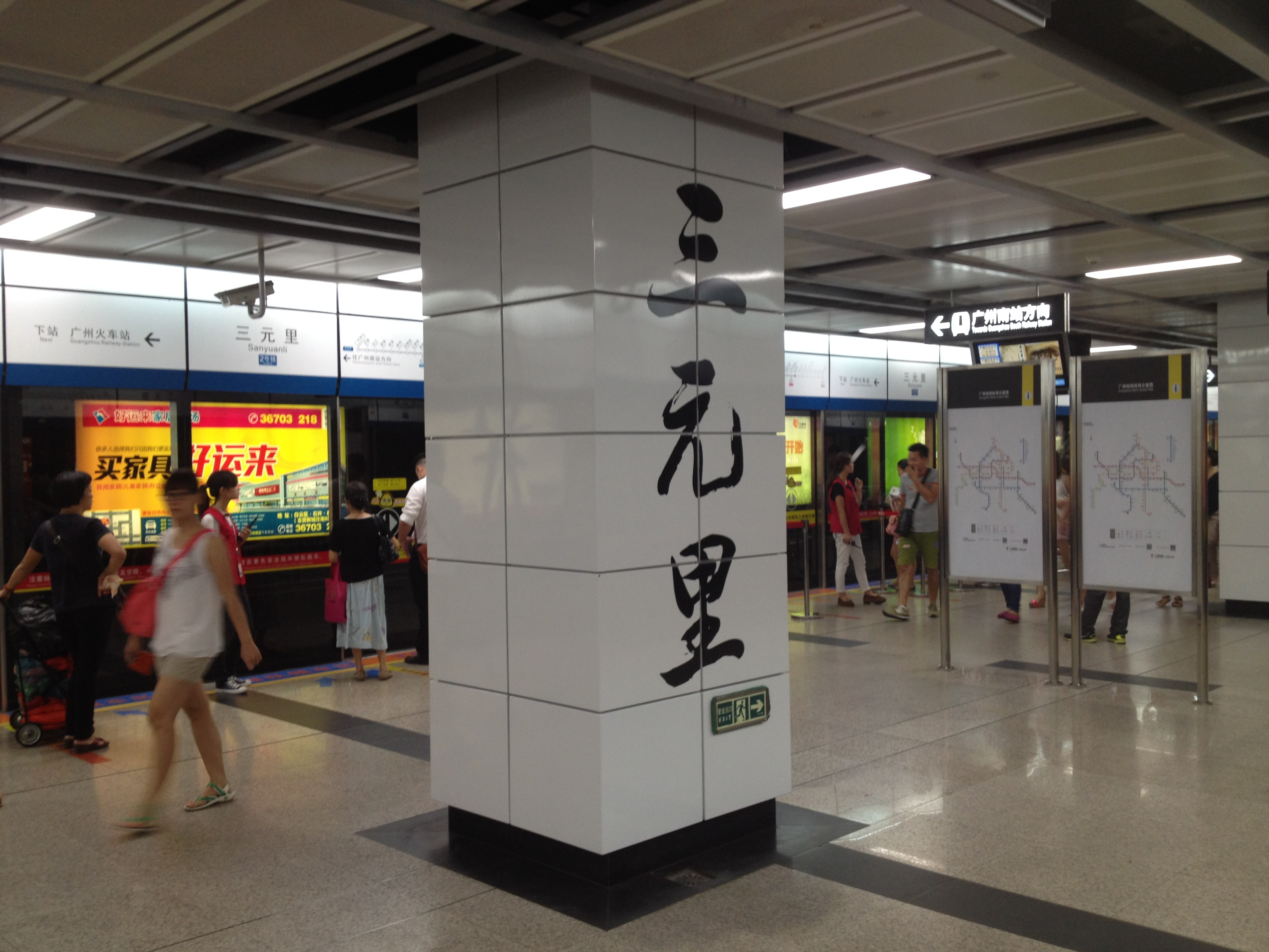 广州地铁三元里站月台书法字